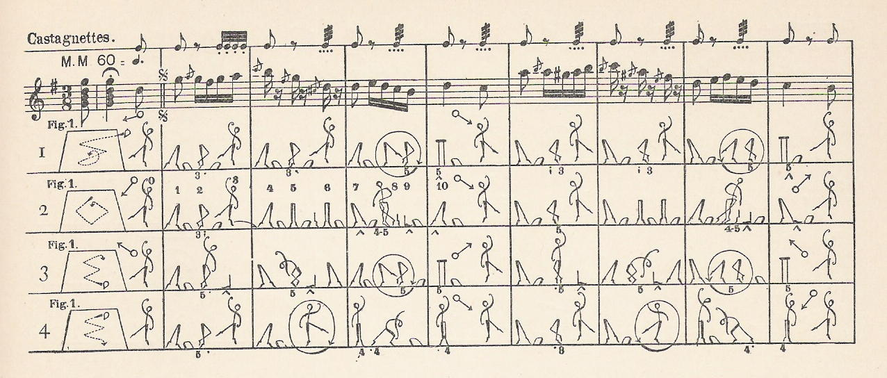 Collection privée